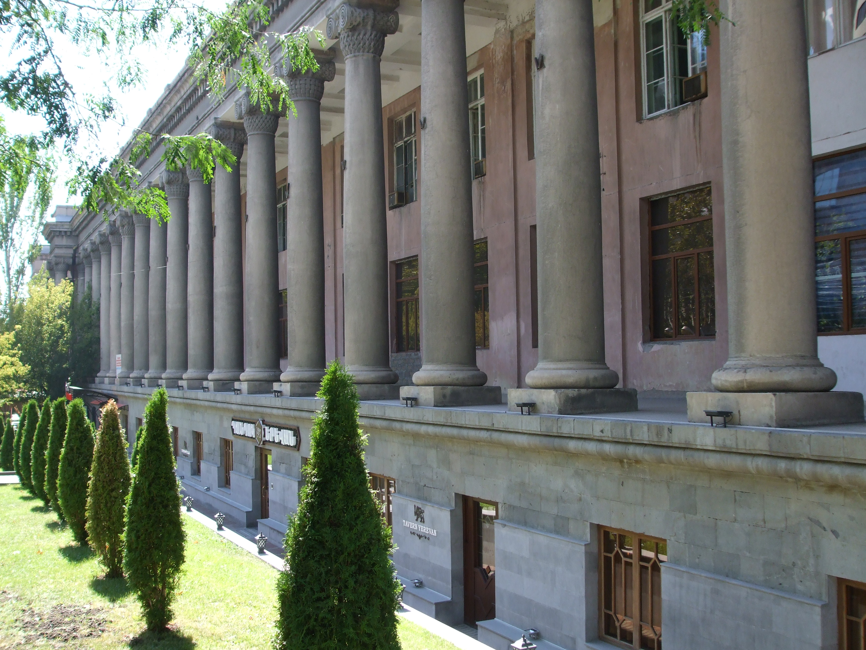 Գրքի պալատի շենքի Տերյան փող. հատվածը, 1940 թ., 1960 թ., Տերյան փող. 91, Իսահակյան փող. 28, Գ. Քոչարի փող. 4, ճարտ.` Ս. Մազմանյան, Հ. Մարգարյան, Ս. Ներսիսյան, 1967-ից այս շենքում է գործում Երևանի դրամատիկական թատրոնը 6/67